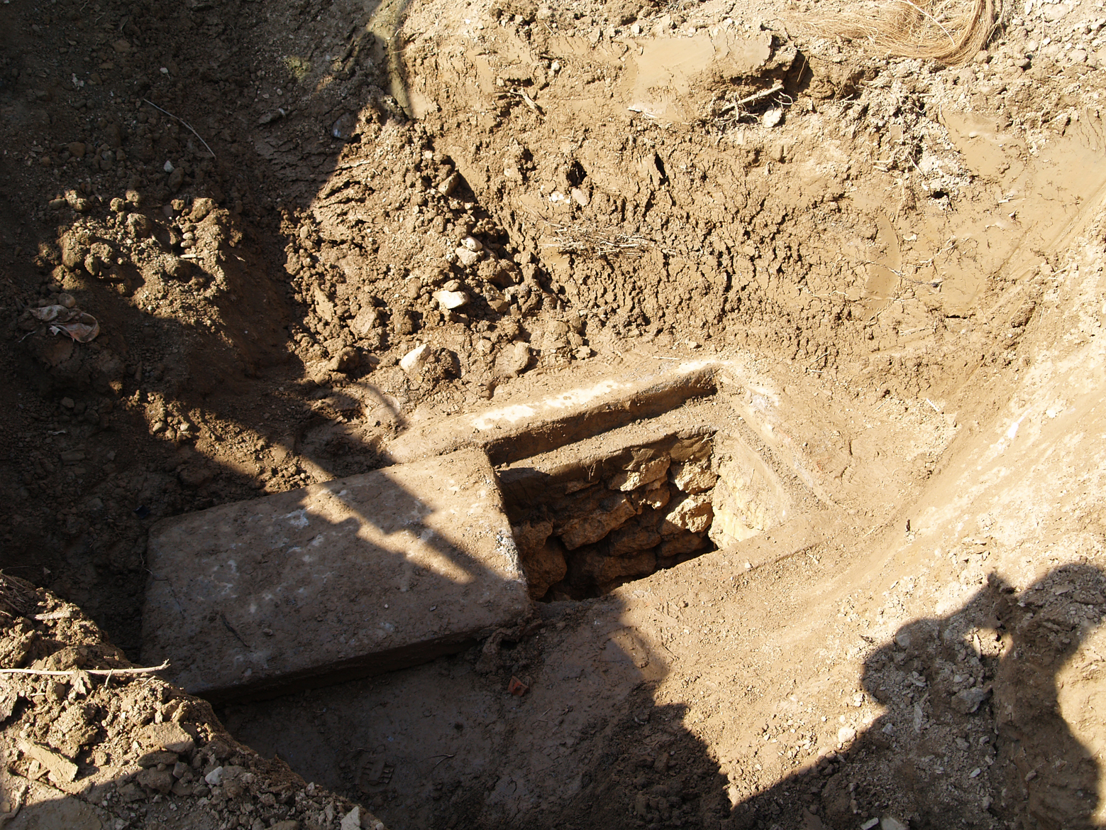 Detalle de uno de los accesos a la galería subterránea mediante una lumbrera